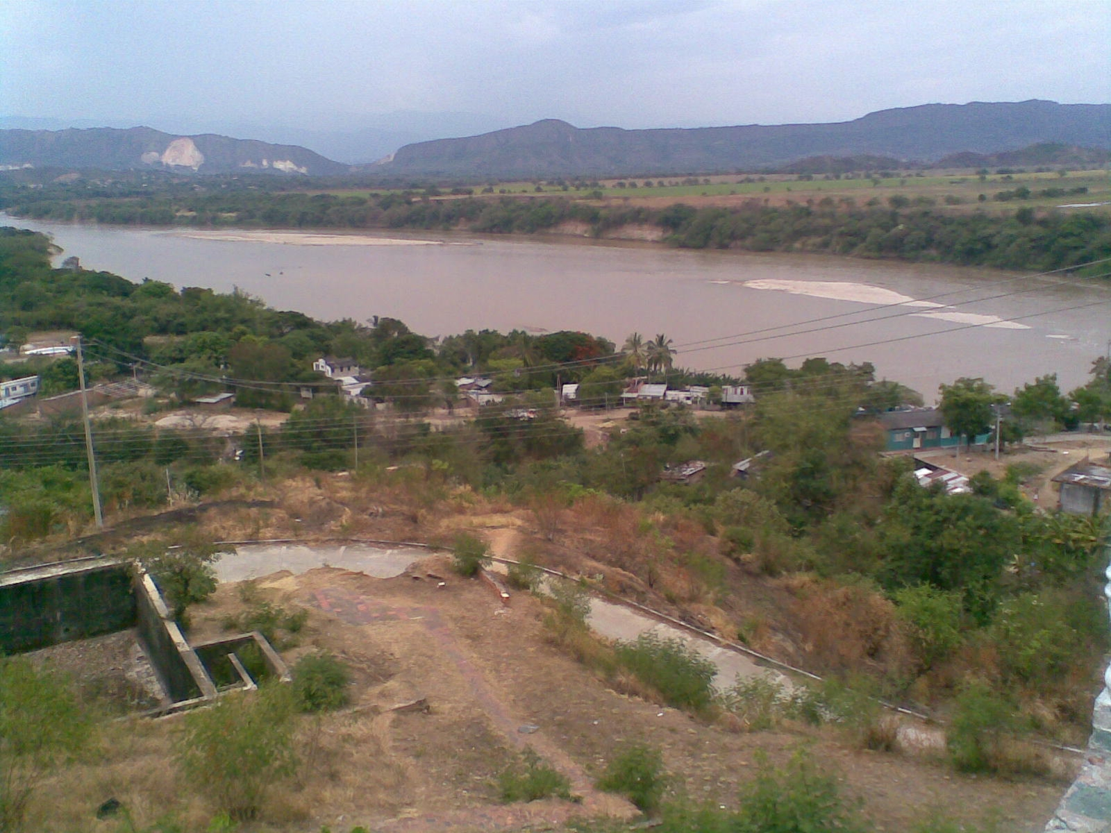 Alto de las Rosas en Girardot Cundinamarca. Se aprecia el Rio Magdalena.